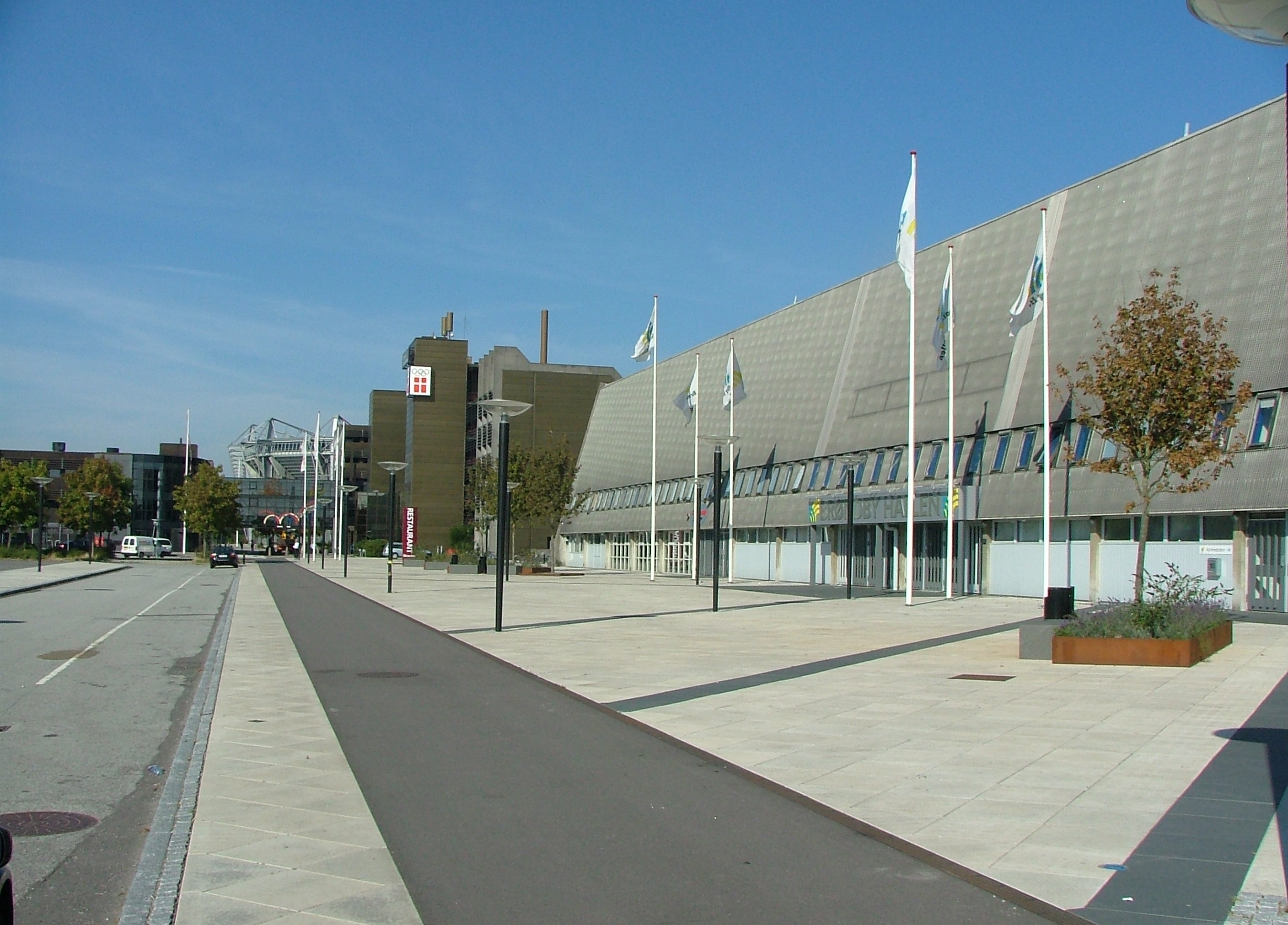 Brøndbyhallen and House of sports, in Brøndby, near Copenhagen